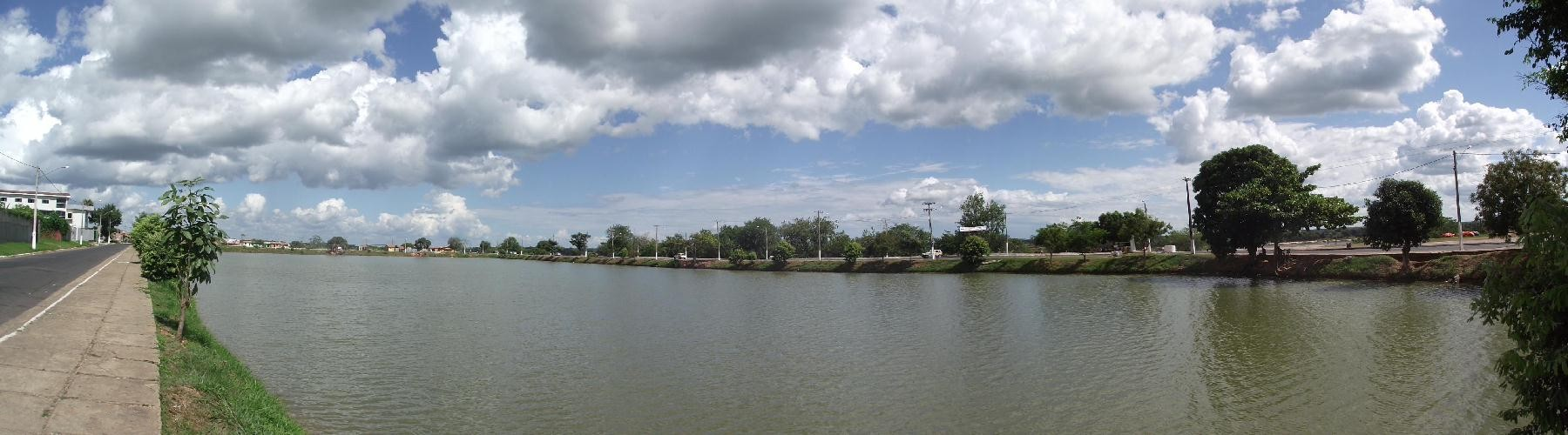 Lagos da Avenida João de Deus Fiquene, a Avenida Beira Rio. Imperatriz Maranhão, Brasil.